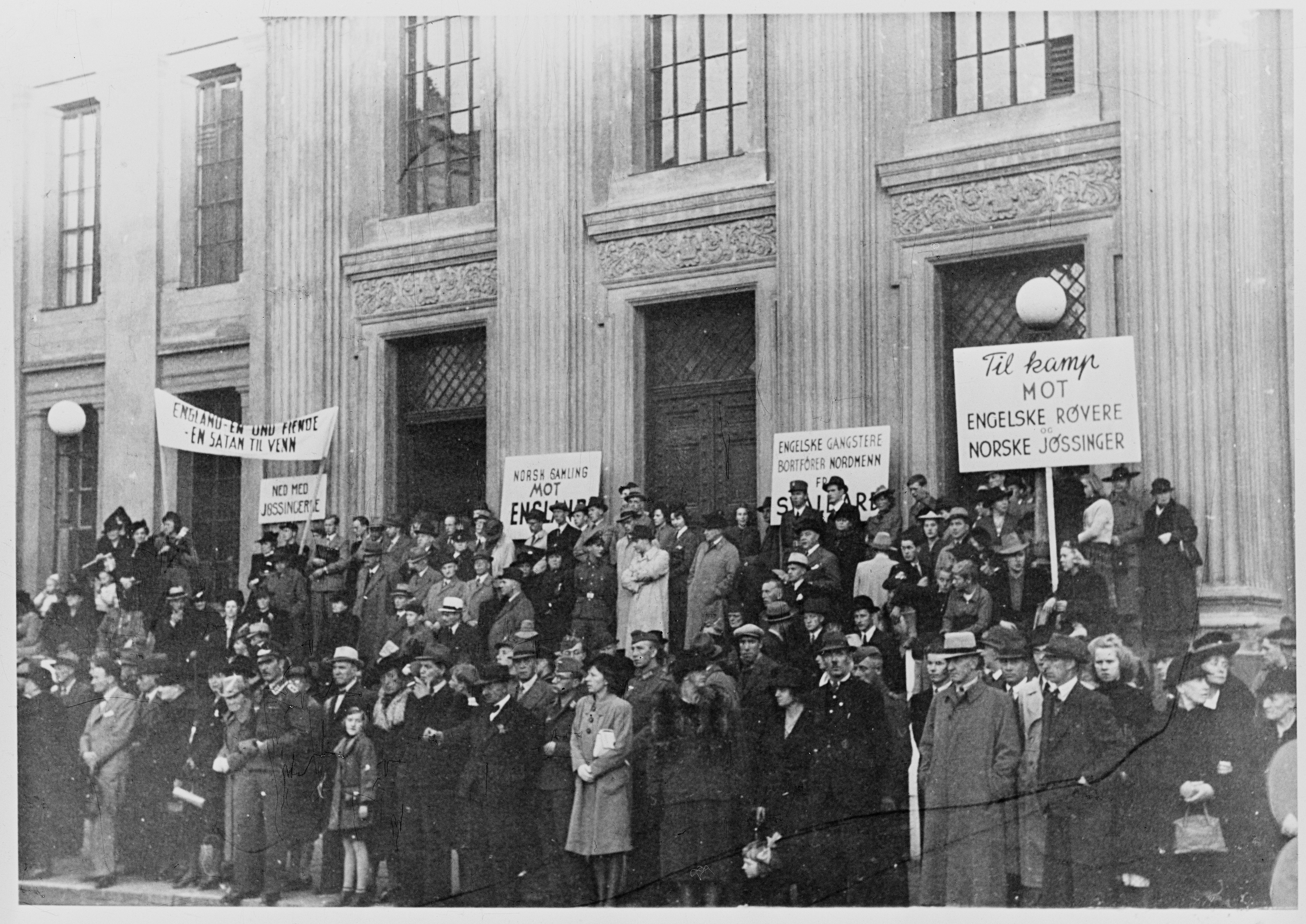 Norge under okkupasjonen. Antijøssing-demonstrasjoner i Oslo. Dette bilde er tatt under en av de «anti-jøssing-demonstrasjoner» som quislingene med tyskernes støtte arrangerte flere av i løpet av 1941 – den gangen da tyskerne fremdeles trodde det skulle være mulig å snu stemningen i Norge til fordel for den tyske politikken. Dette bilde er tatt under innmarsjen på Universitetsplassen. På plakatene kan en lese «Engelske gangstere bortfører nordmenn fra Svalbard» og «Til kamp mot engelske røvere og norske jøssinger». På bildet ser en deltakere i oppmarsjen oppstilt for fotografering på universitetstrappen. Som dere ser, er det ikke tale om noen overveldende tilslutning, og disse demonstrasjonene ble meget snart innstilt. London, 14.02.44Under andre verdenskrig i Norge arrangerte Nasjonal Samling (NS) 16. september 1941 demonstrasjonstog i Oslo med påfølgende protestmøte «mot England og jøssinger» på Universitetsplassen. NS-minister Gulbrand Lunde talte og sivile Oslo-borgere og hirdavdelinger deltok. Foranledninga var blant annet den britiske torpederinga av to norske hurtigruteskip 13. september 1941 der 211 mennesker omkom: Klokka 03:48 senka en torpedo sluppet fra et britisk krigsfly DS «Barøy» ved Hamarøy og drepte 112 mennesker (18 ble reddet), mens en britisk ubåt samme formiddag torpederte DS «Richard With» ved Rolvsøya og tok livet av 99 mennesker (31 overlevde). Britene hadde dessuten destruert strategiske objekter (oljelagre, radiostasjoner mm.) på Svalbard 3. september og evakuert den norske befolkninga der til Storbritannia.Bildet viser oppstilte demonstranter med plakater på trappa foran «Urbygningen». Også Filmavisen 29. september 1941 har kort propagandareportasje om «Demonstrasjon mot England» denne dagen.NB! CC-lisensene angir hvilke vilkår som gjelder for videre bruk av fotografiet. Arkivverket ber om at vilkårene for bruk respekteres. Fotograf, rettighetshaver og bevaringsinstitusjon skal i alle tilfeller krediteres.